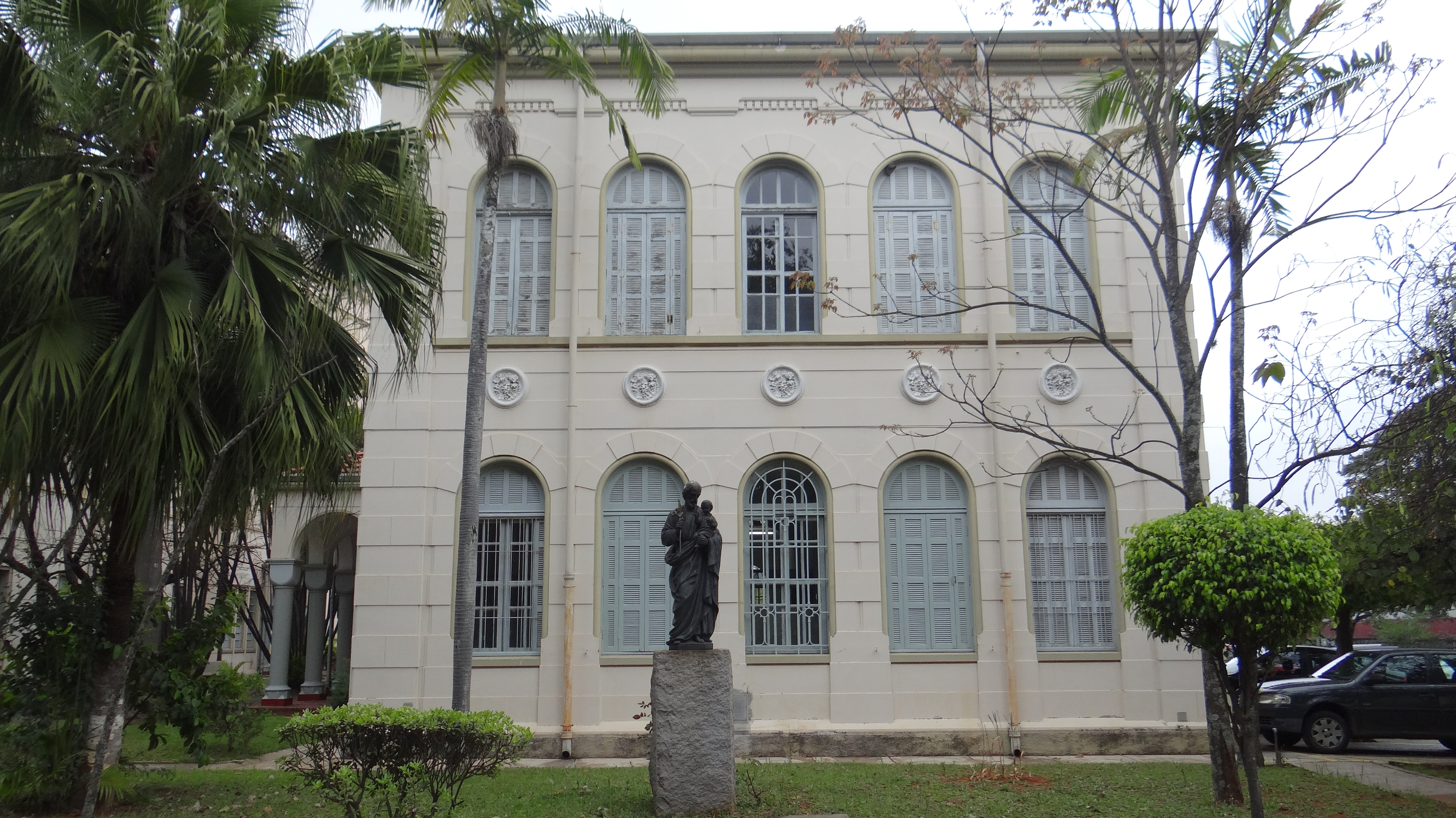 Lateral do Bloco 2 (salas de aulas da PUC-SP) no Seminário Central do Ipiranga, São Paulo (SP), Brasil.